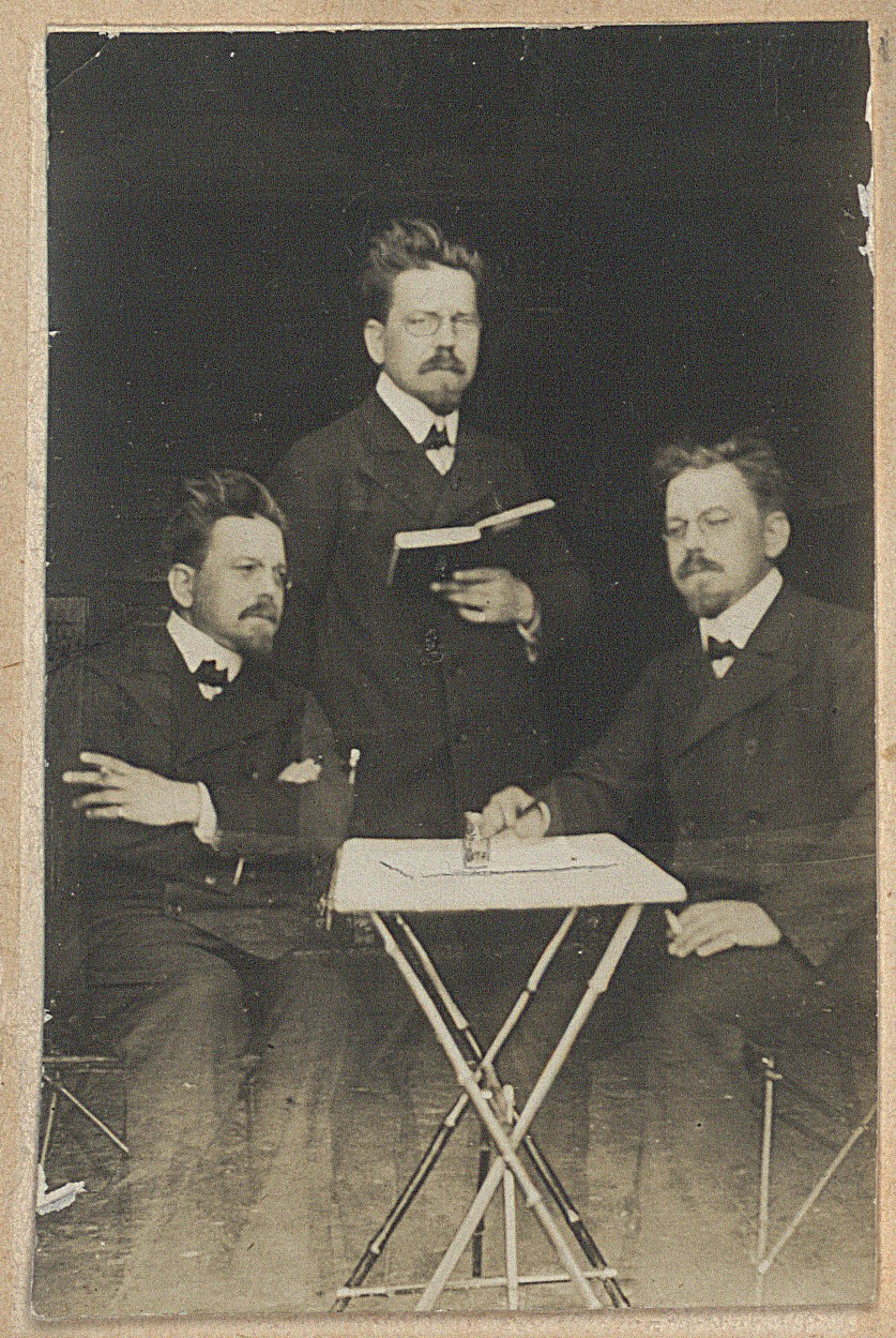 Wł. Reymont portret potrójny, 1905 r.